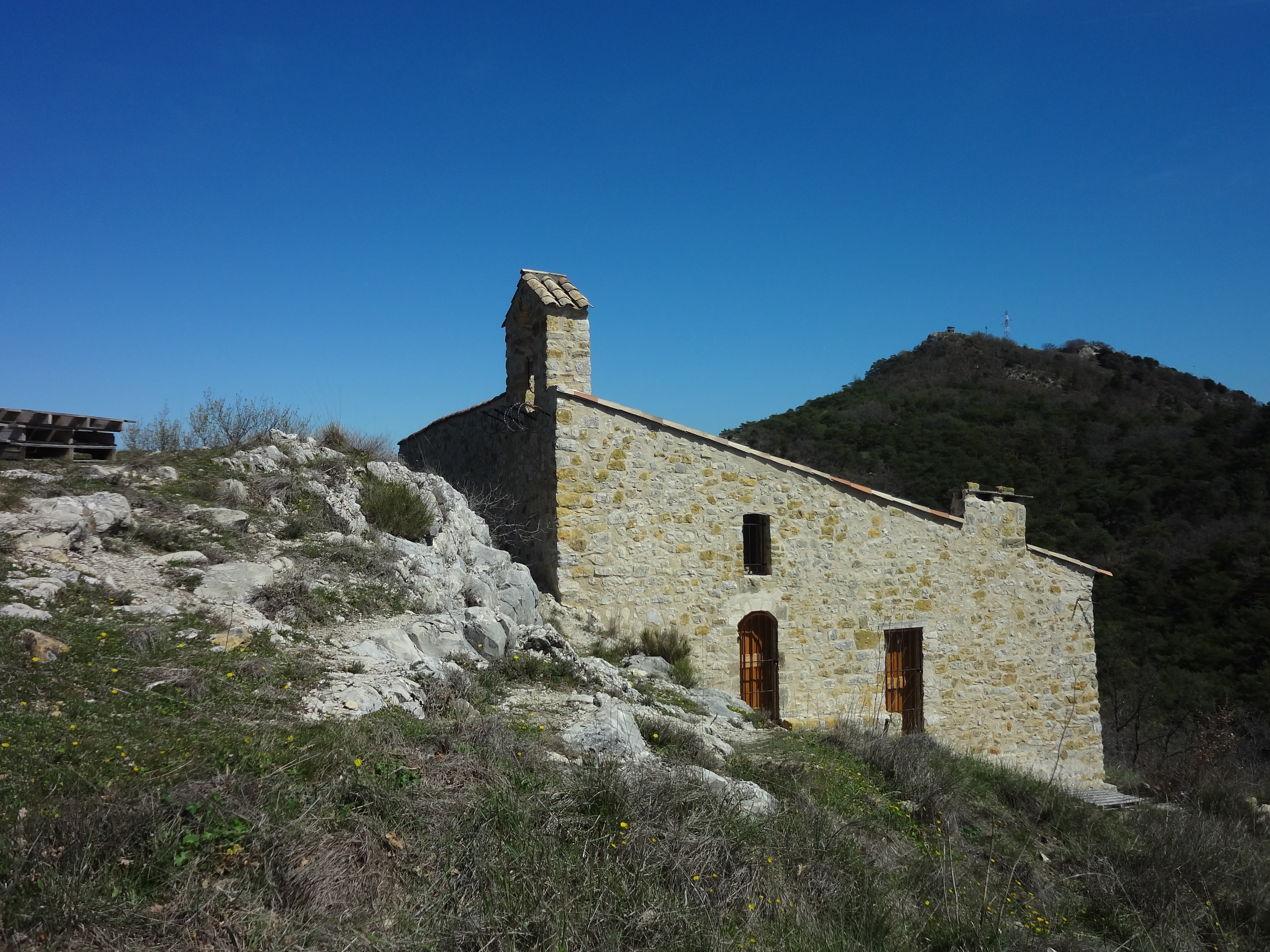 avec clocher-mur défendu par des barbelés. Restaurée et convertie en habitation